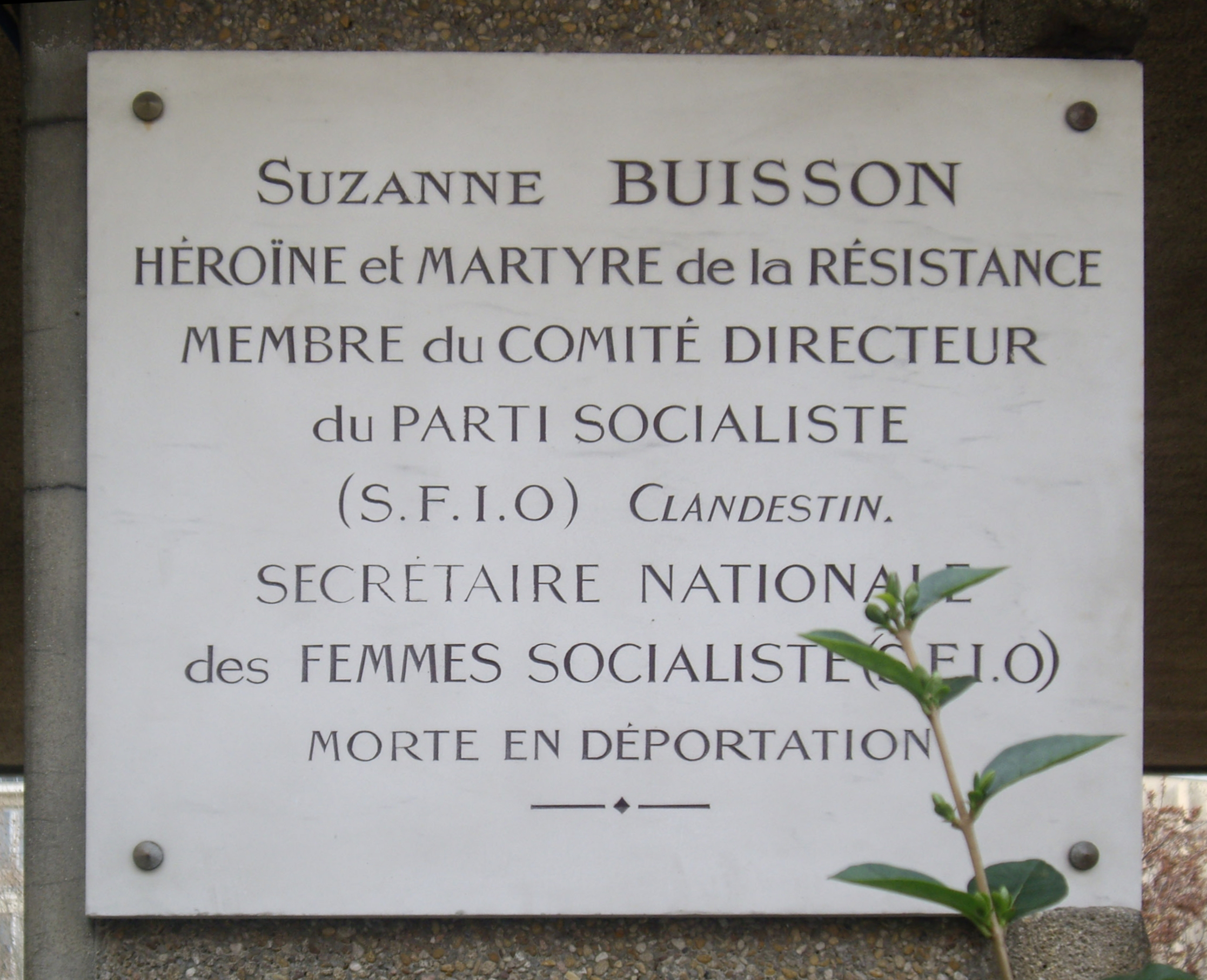 Plaque en mémoire de la résistante Suzanne Buisson (1883-194?), square Suzanne-Buisson, Paris 18e. « Suzanne Buisson, héroïne et martyre de la Résistance, membre du comité directeur du Parti socialiste (SFIO) clandestin, secrétaire nationale des femmes socialistes (SFIO), morte en déportation. »